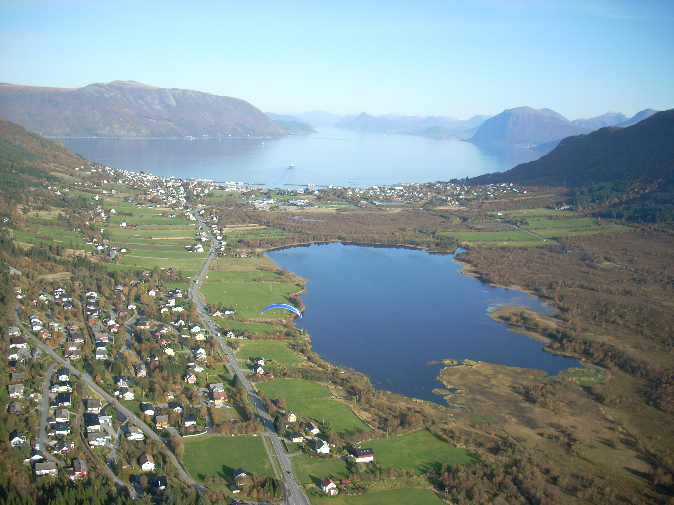 Hareid